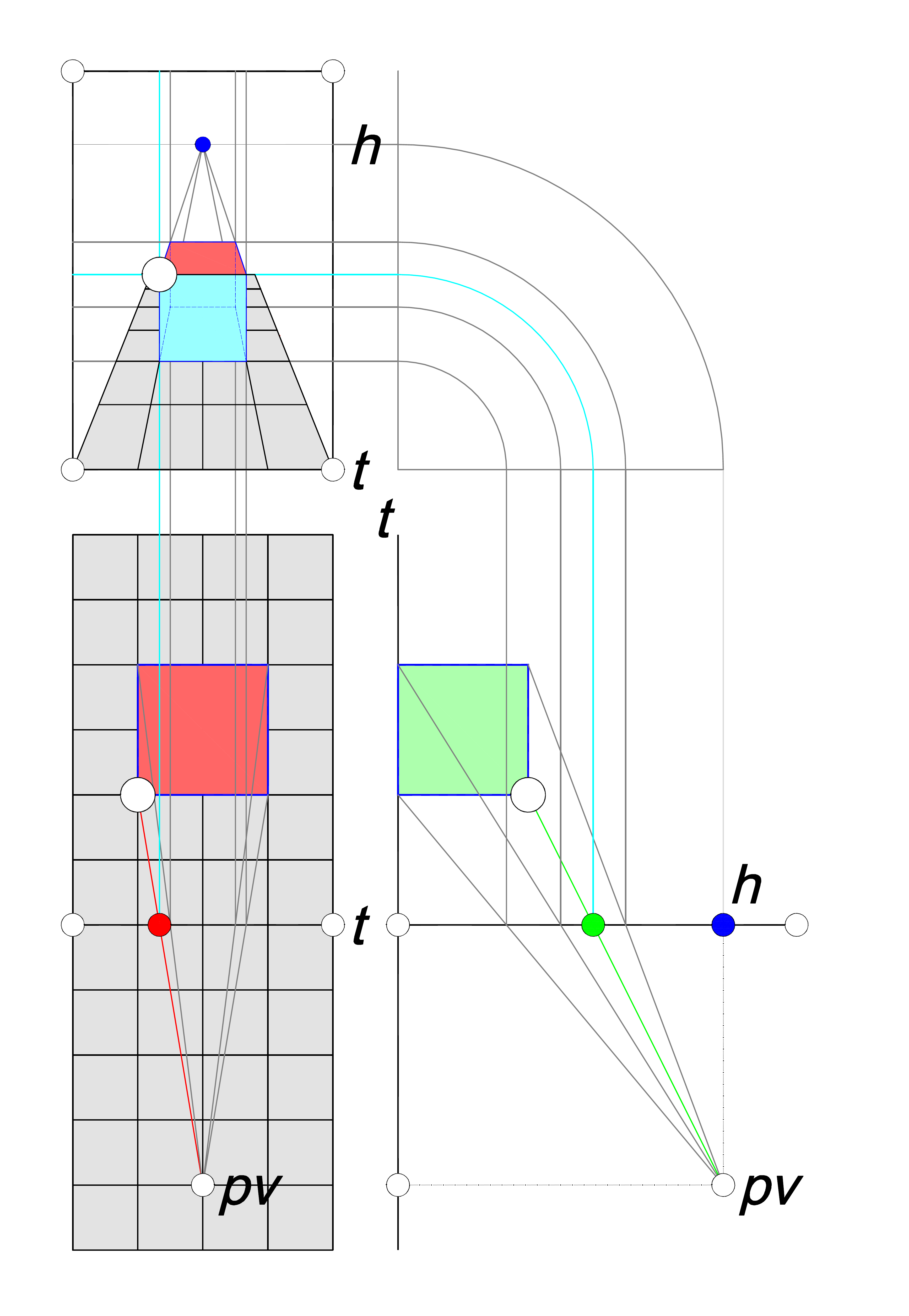 Procedimiento gráfico general para dibujar una perspectiva cónica a partir de la proyección diédrica del modelo